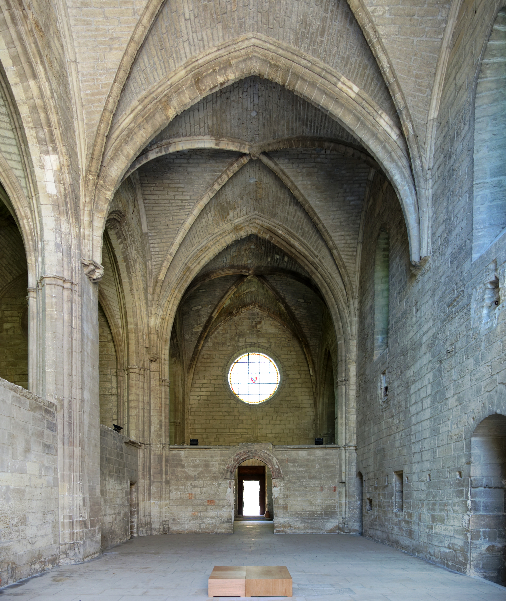 La nef de l'église de la Chartreuse du Val de Bénédiction à Villeneuve-lès-Avignon.